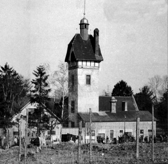 An den 1930er Joeren huet Mineralwaasserquell Bel-Val d'Dieren zougemaacht. Am Zweete Weltkrich hunn d'Preisen de Site als Gefaangenelager fir Zwangsaarbechter benotzt an nom Krich goufen hei Kollaborateuren internéiert.